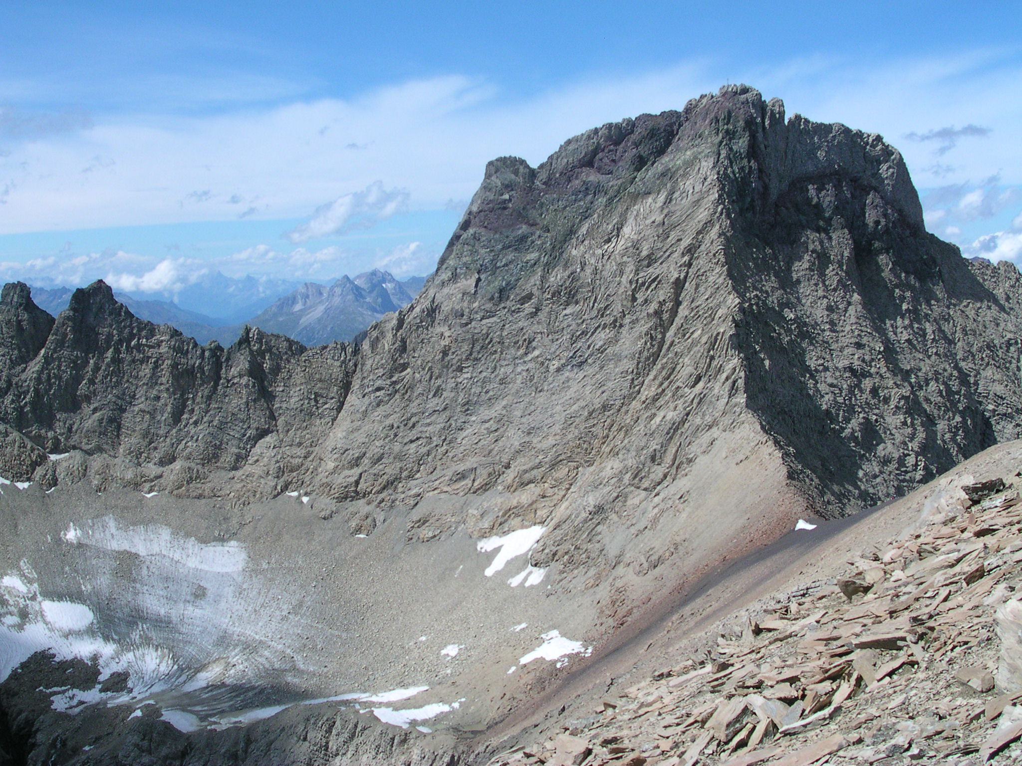 Patrolscharte (Vordergrund) und Parseierspitz von Osten (Gatschkopf)